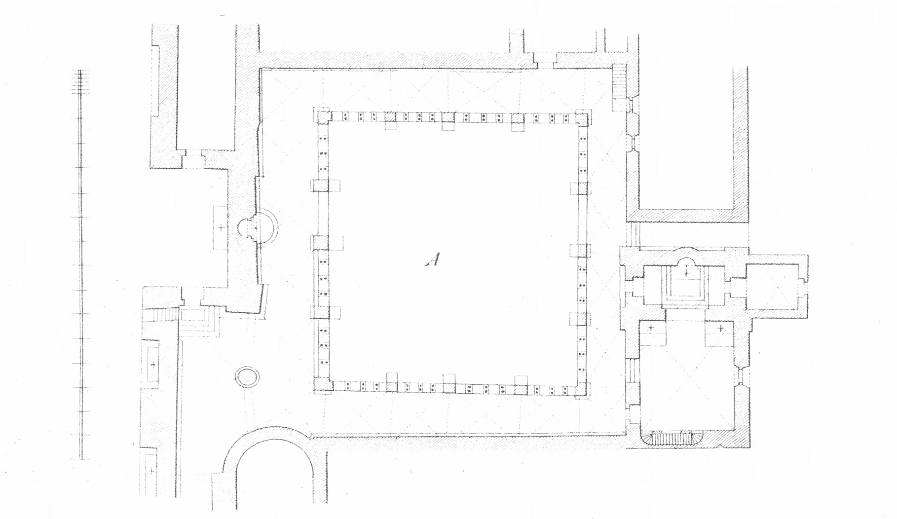 Bilder aus dem in derselben Kategorie befindlichen Artikel aus den Mittheilungen der kaiserl. königl. Central-Commission zur Erforschung und Erhaltung der Baudenkmale Band 1, 1856.